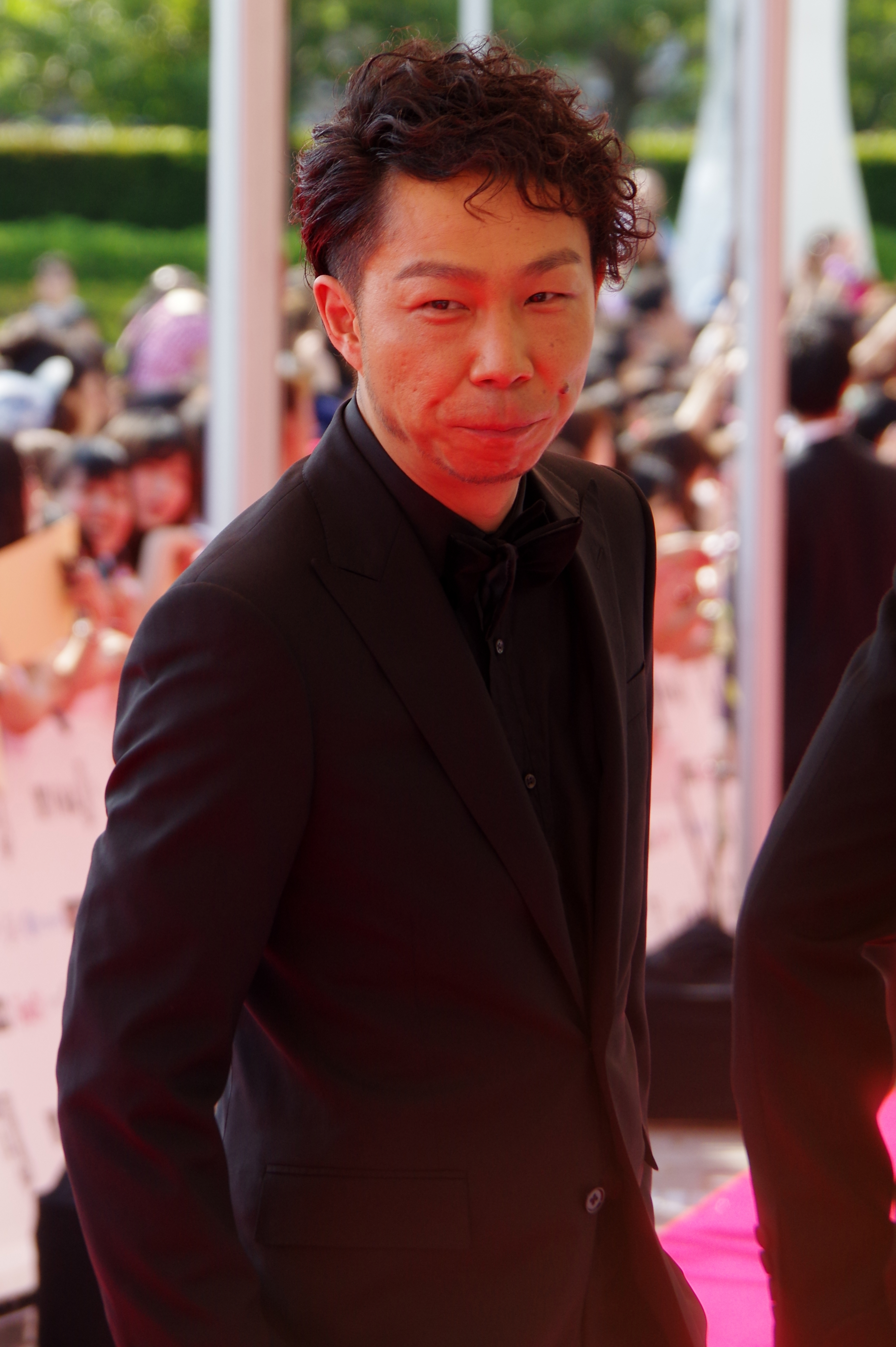 MTV VMAJ 2014_020_EXILE（USA）